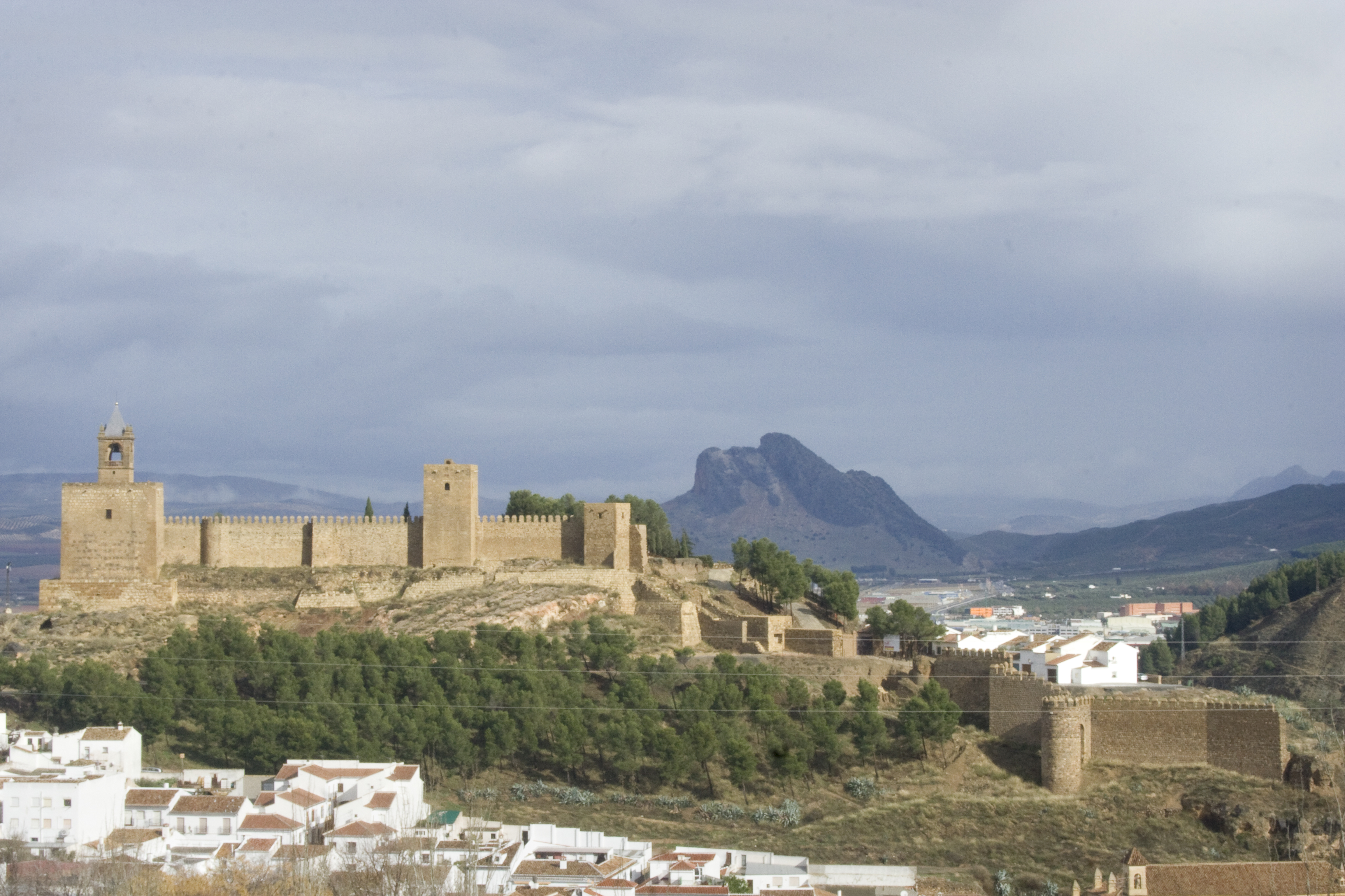 Alcazaba y Peña de los Enamorados, Antequera, España.